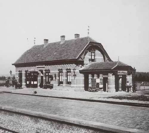 Station Westervoort(Netherlands)